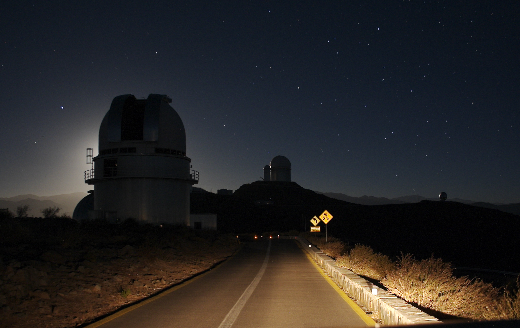 Vue nocture de l'Observatoire de La Silla au Chili.